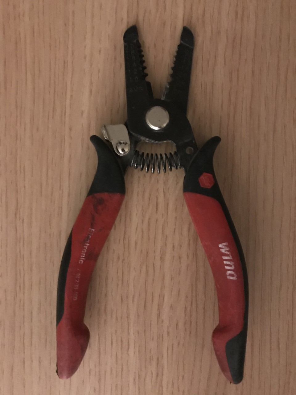 Ingliskeele tüve järgi nimetatakse juhtmekoorimistange kõnekeeles strippariteks.